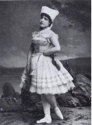 La ballarina reusenca Roseta Mauri fotografiada amb la vestmenta de l'obra "La Korrigane" estrenada a l'Òpera de París el 1890.